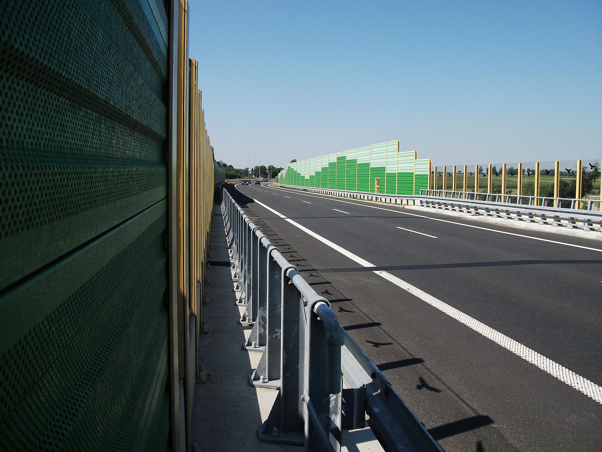 Obwodnica Krzepic w ciągu drogi krajowej nr 43